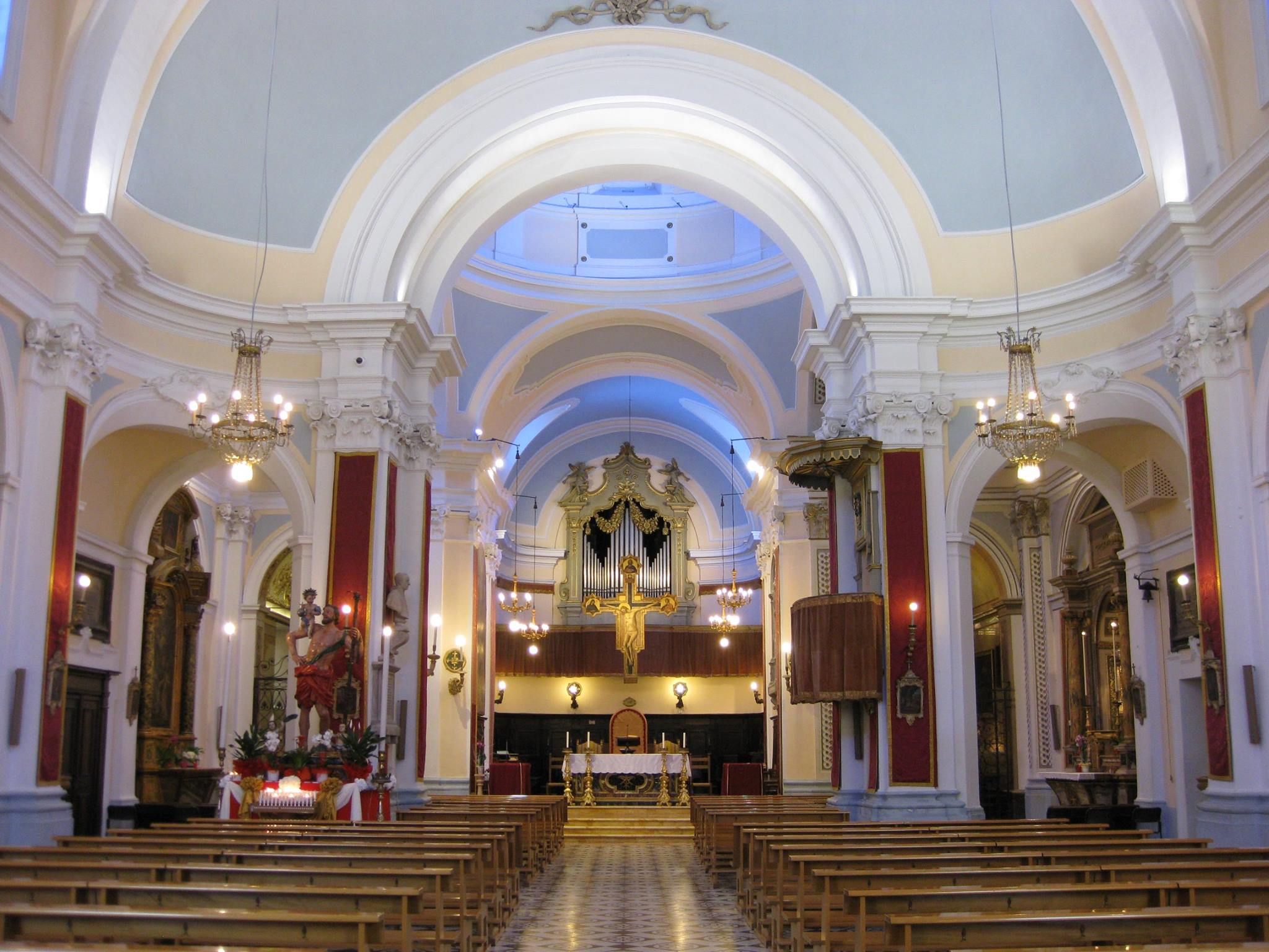 Cattedrale Urbania paratura San Cristoforo 2016